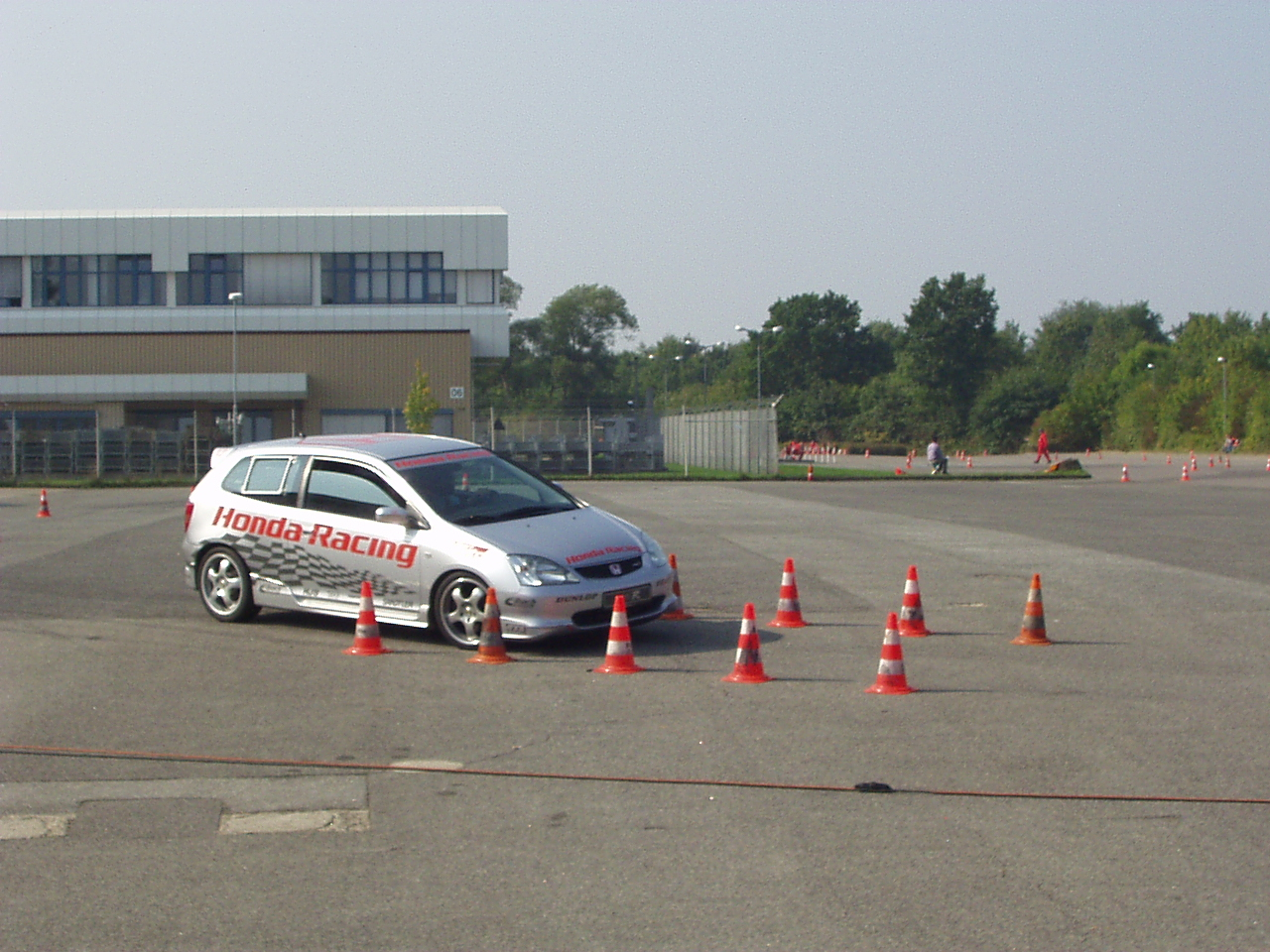 Hineinbremsen in die Pylonenkurve